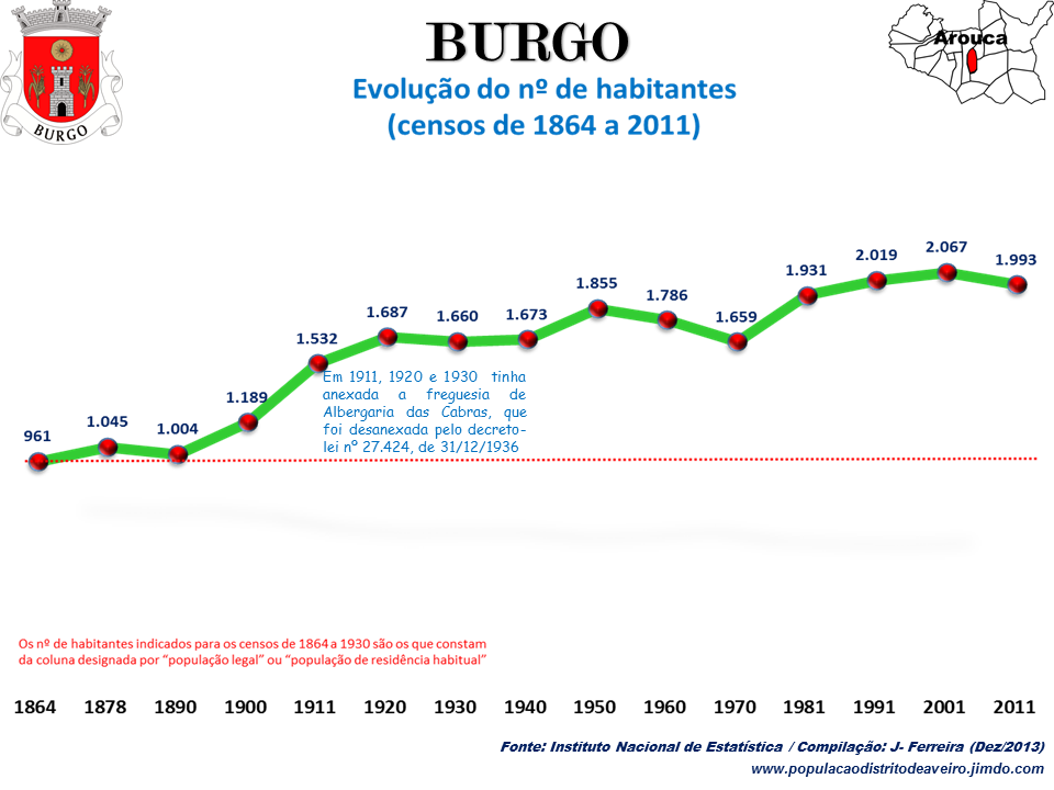 Evolução da População 1864 / 2011